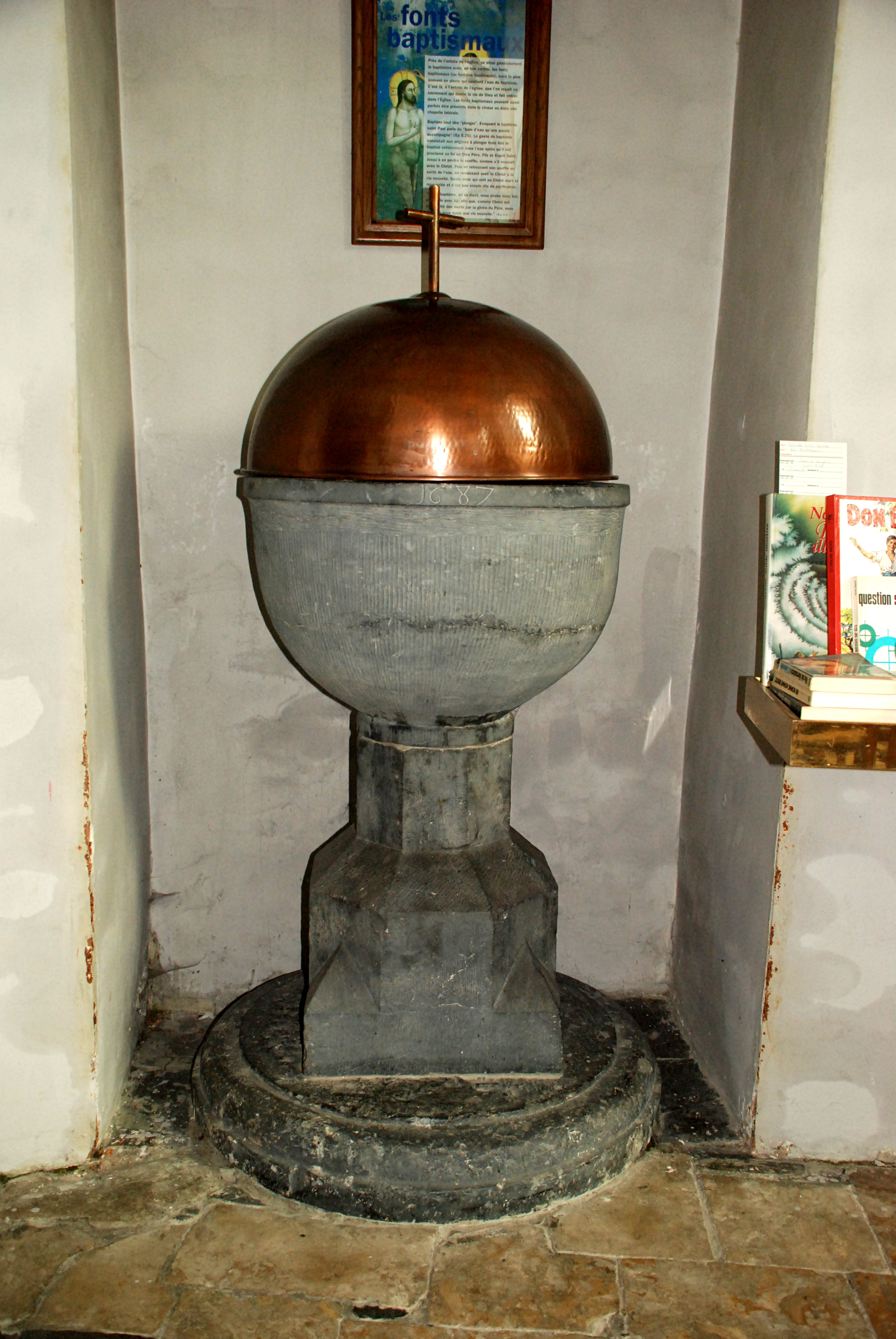 Belgique - Brabant wallon - Jodoigne - Saint-Remy-Geest - Église Saint-Remy